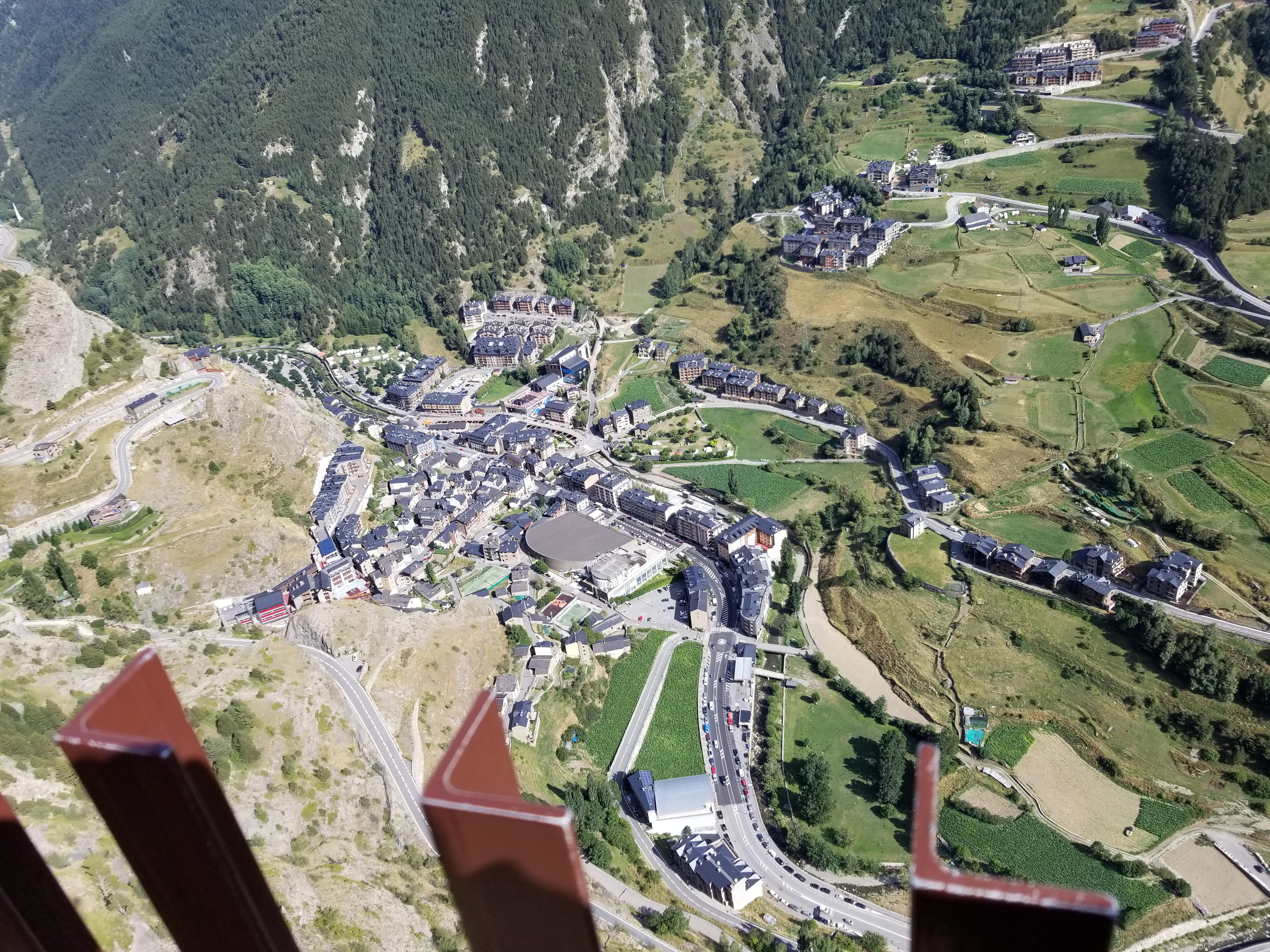 העיירה קאנילו באנדורה